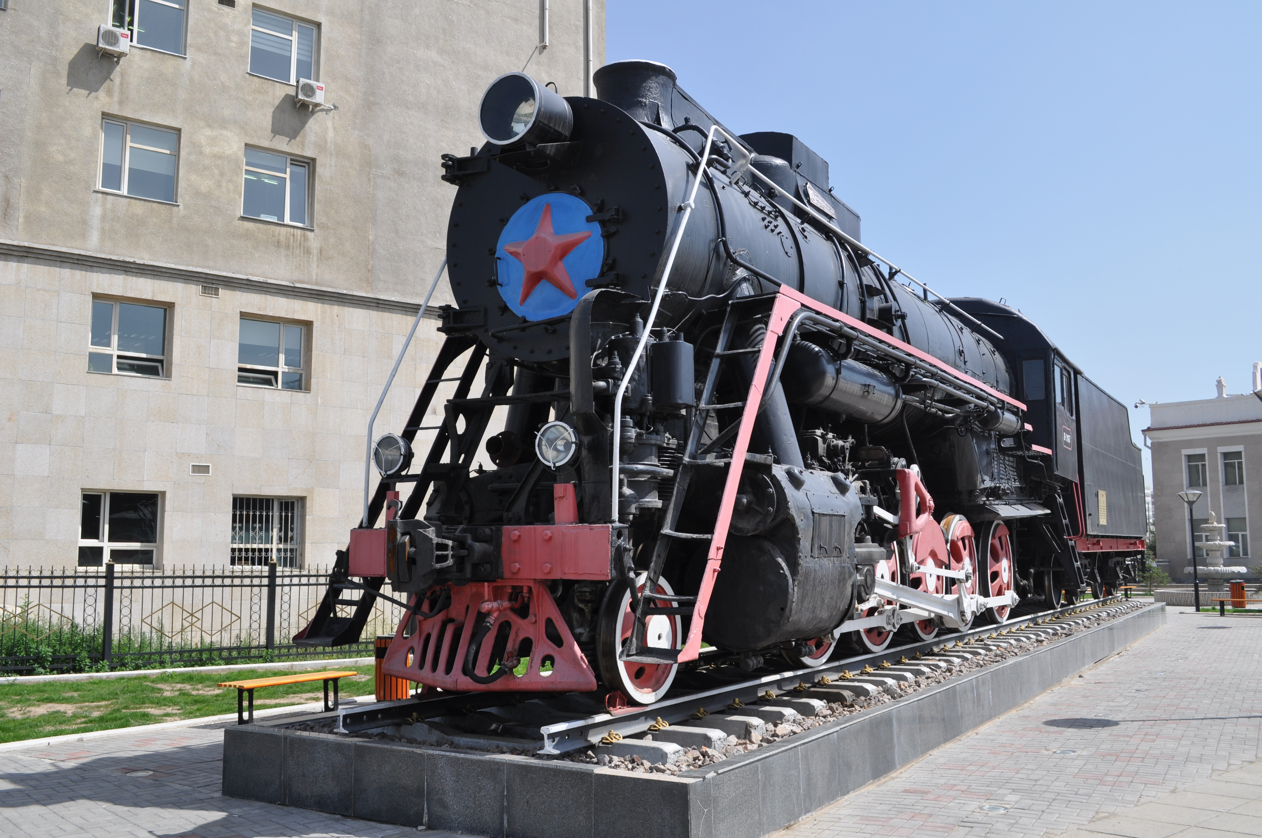 Паровоз Л-3167 вокзал города Улан-Батор